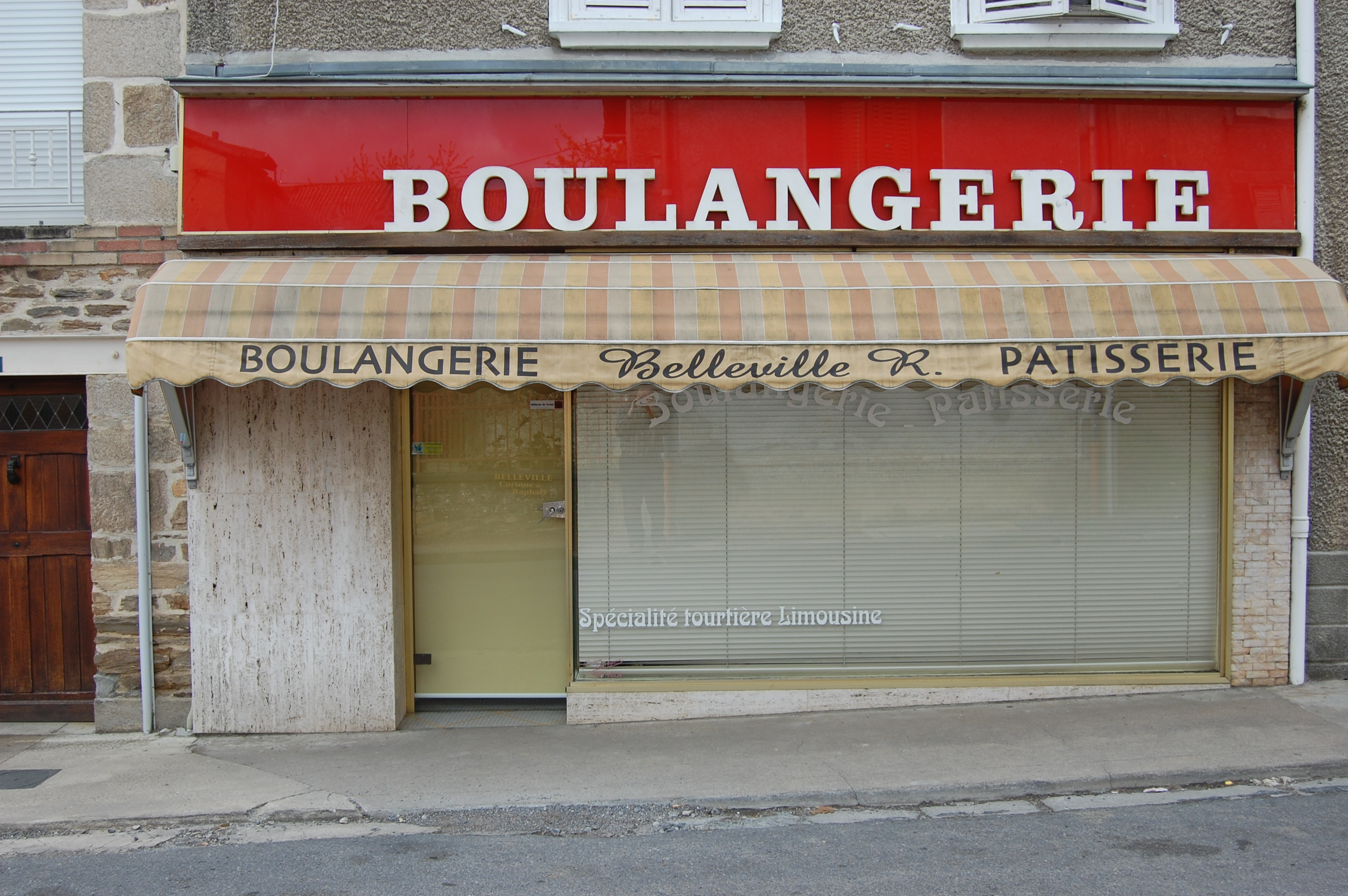 Boulangerie d'Oradour-sur-Vayres (Haute-Vienne, France) faisant de la tourtière limousine une spécialité.